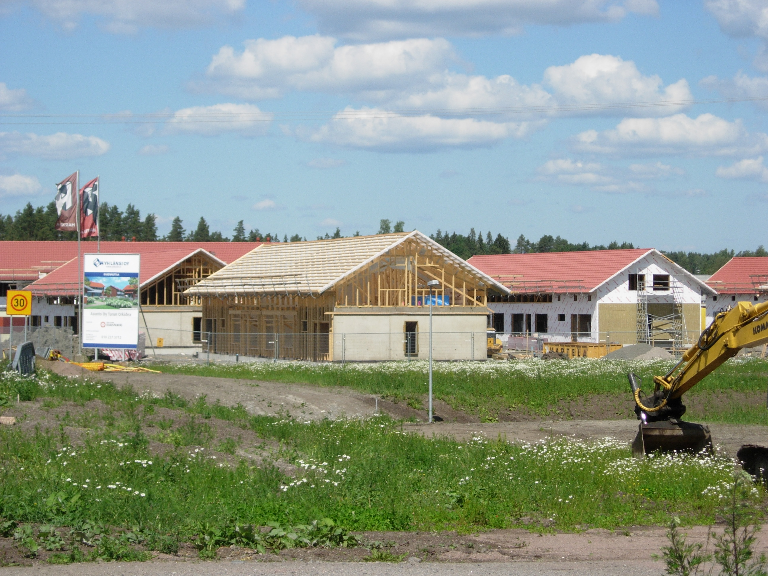 Liljalaaksoa rakenteilla. Perennatie, Turku.